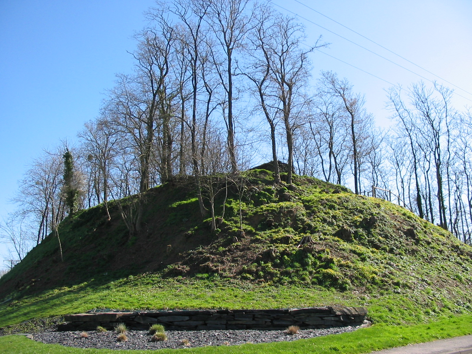 La butte de la grand'PouëzeLa Pouëze en Maine-et-Loire (France).